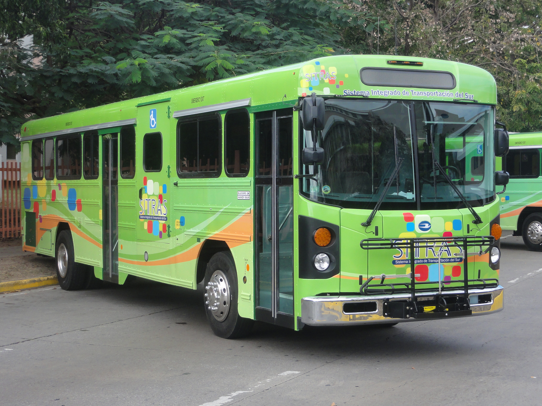 SITRAS Bus, Ponce, Puerto Rico